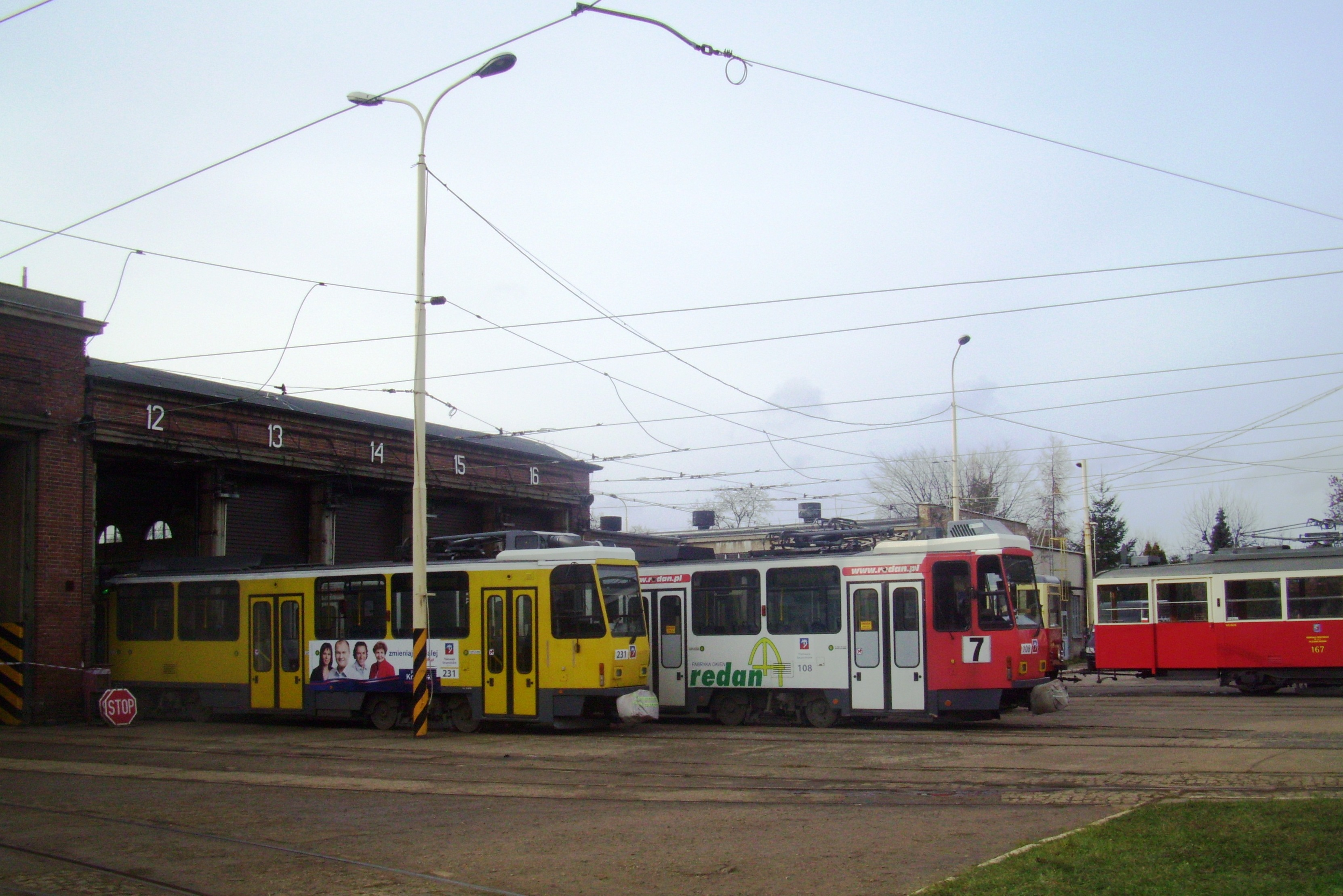 Zajezdnia Pogodno w Szczecinie.